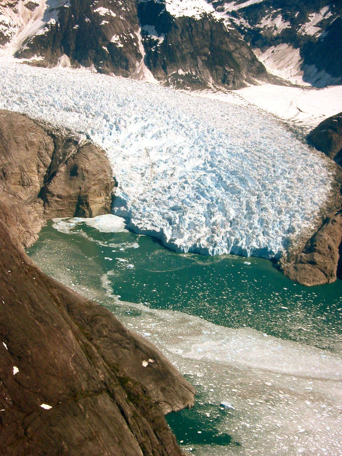 Le Conte glacier, Alaska, USA. LeConte Glacier